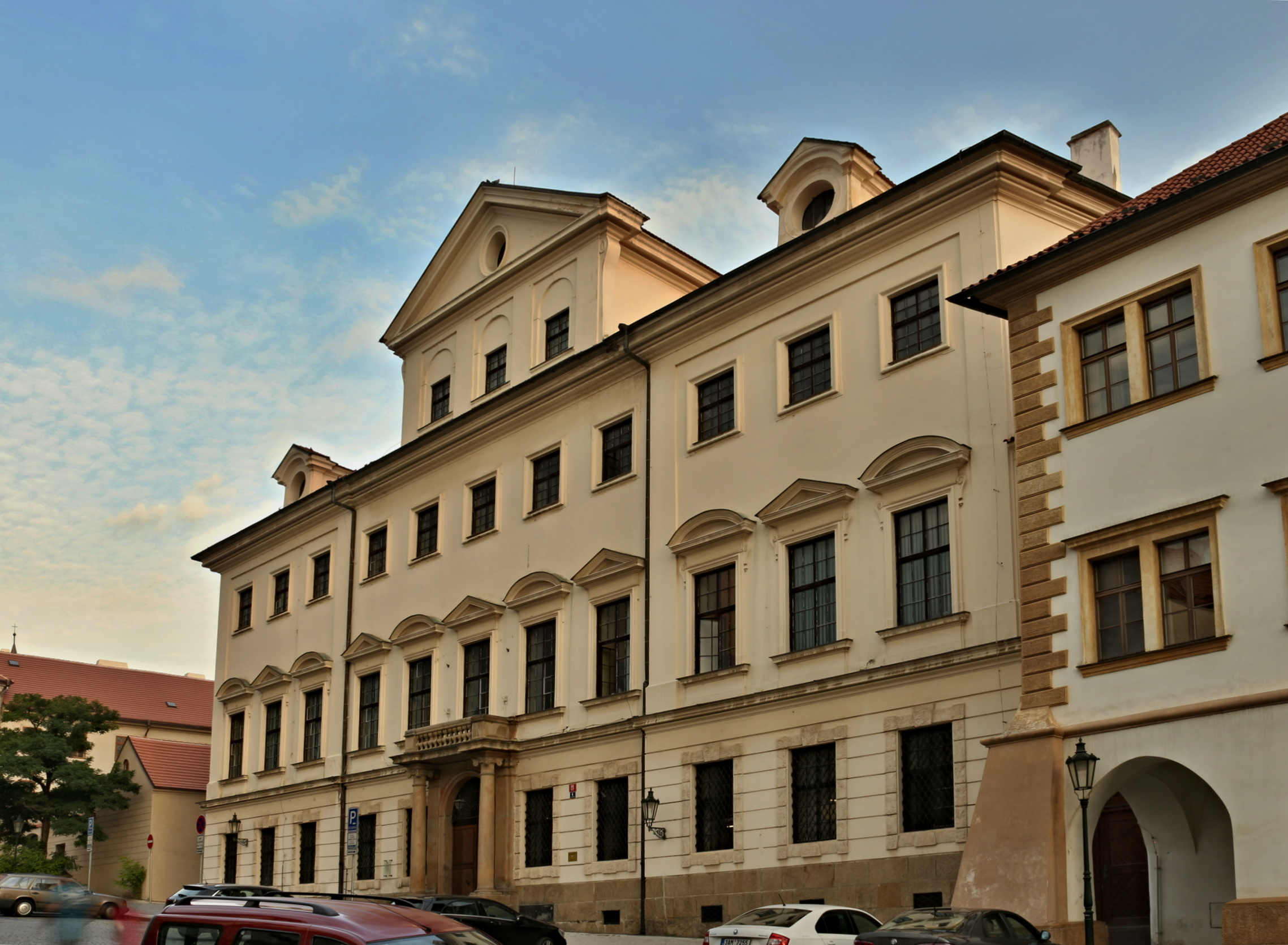 Praha 1-Hradčany, Martinický palác v Loretánské ulici